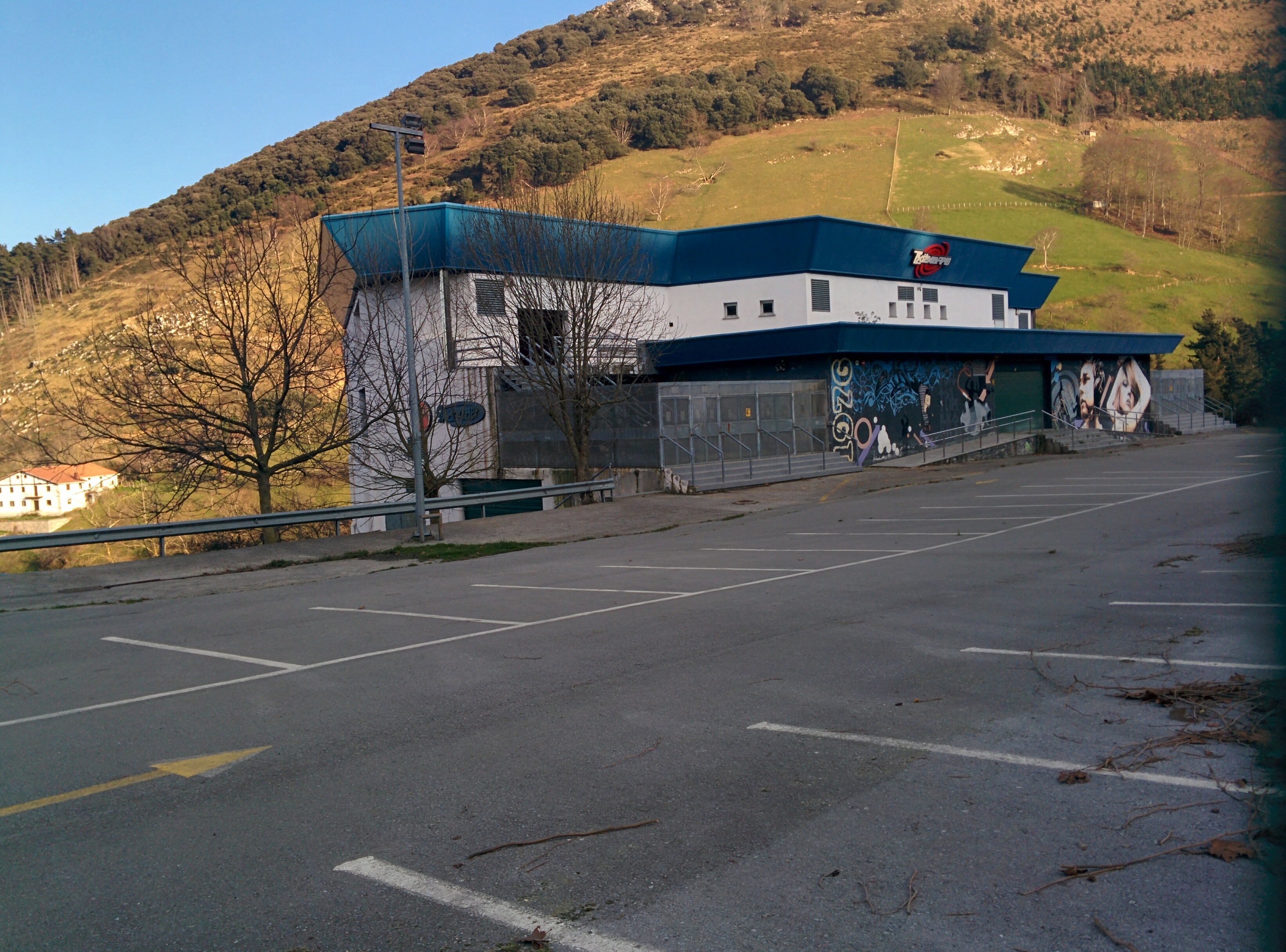 Txitxarro itxita